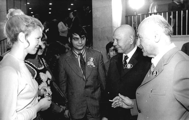 ADN-ZB-Koard 26.10.1973 Sowjetunion- Weltkongreß der Friedenskräfte in Moskau- Zweiter Beratungstag (26.10.73) In herzlichem Gespräch am Vormittag, den 26.10.73 im Foyer des Kongreß-Pallastes des Moskauer Kremel v.r.n.l.: Prof. Albert Norden, Mitglied des Politbüros und Sekretär des ZK der SED; Prof. Sergei Tulpanow von der Staatlichen Universität Leningrad; Hartmut König vom Oktoberclub; die Studentin Petra Genz (halb verdeckt) und Bärbel Schindler-Saefkow.